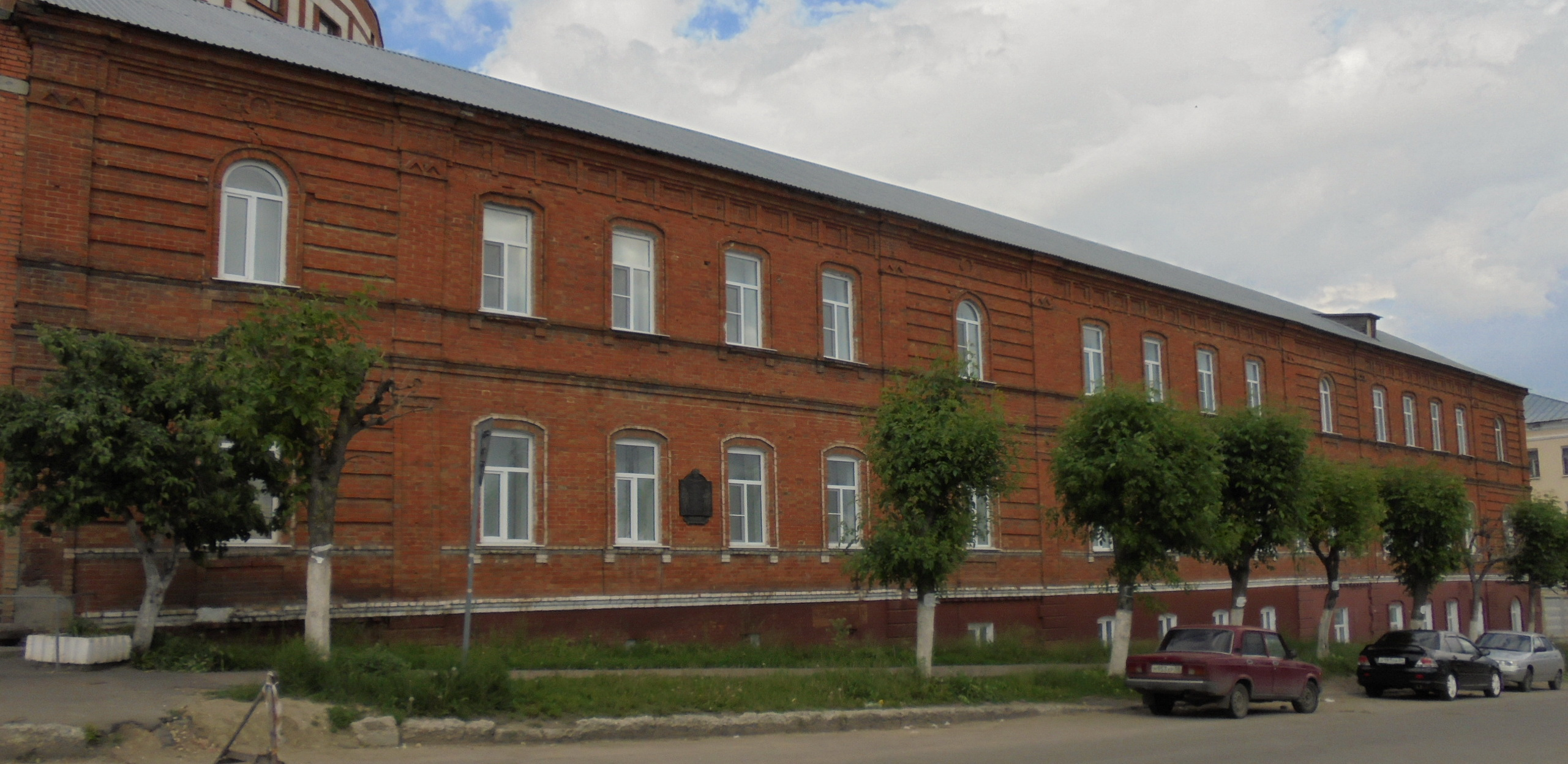 Красная казарма